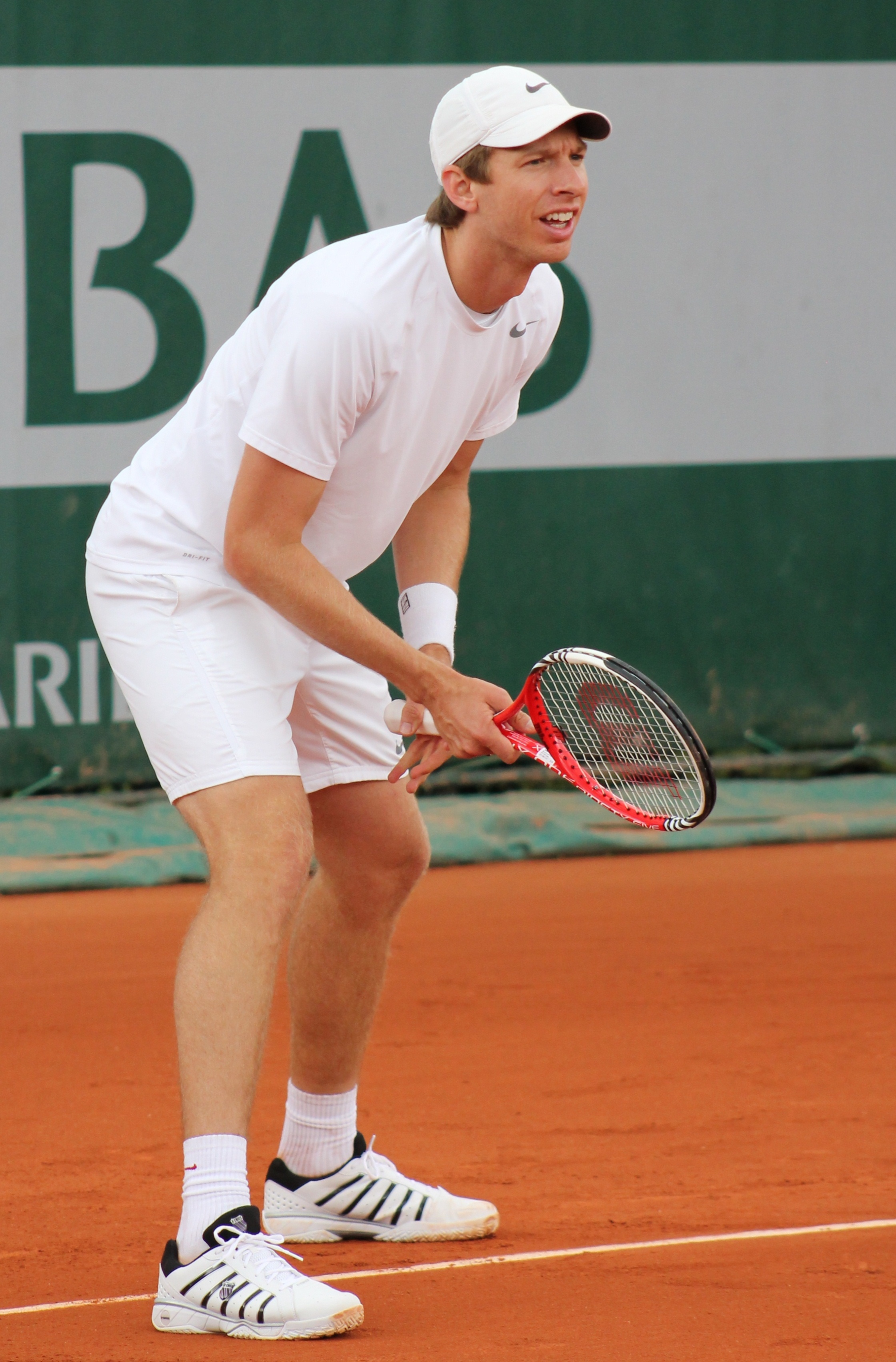 Eric Butorac